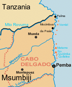 Ramani ya mkoa wa Cabo Delgado -Msumbiji pamoja na funguvisiwa vya Kirimba Imetengenezwa na user:kipala